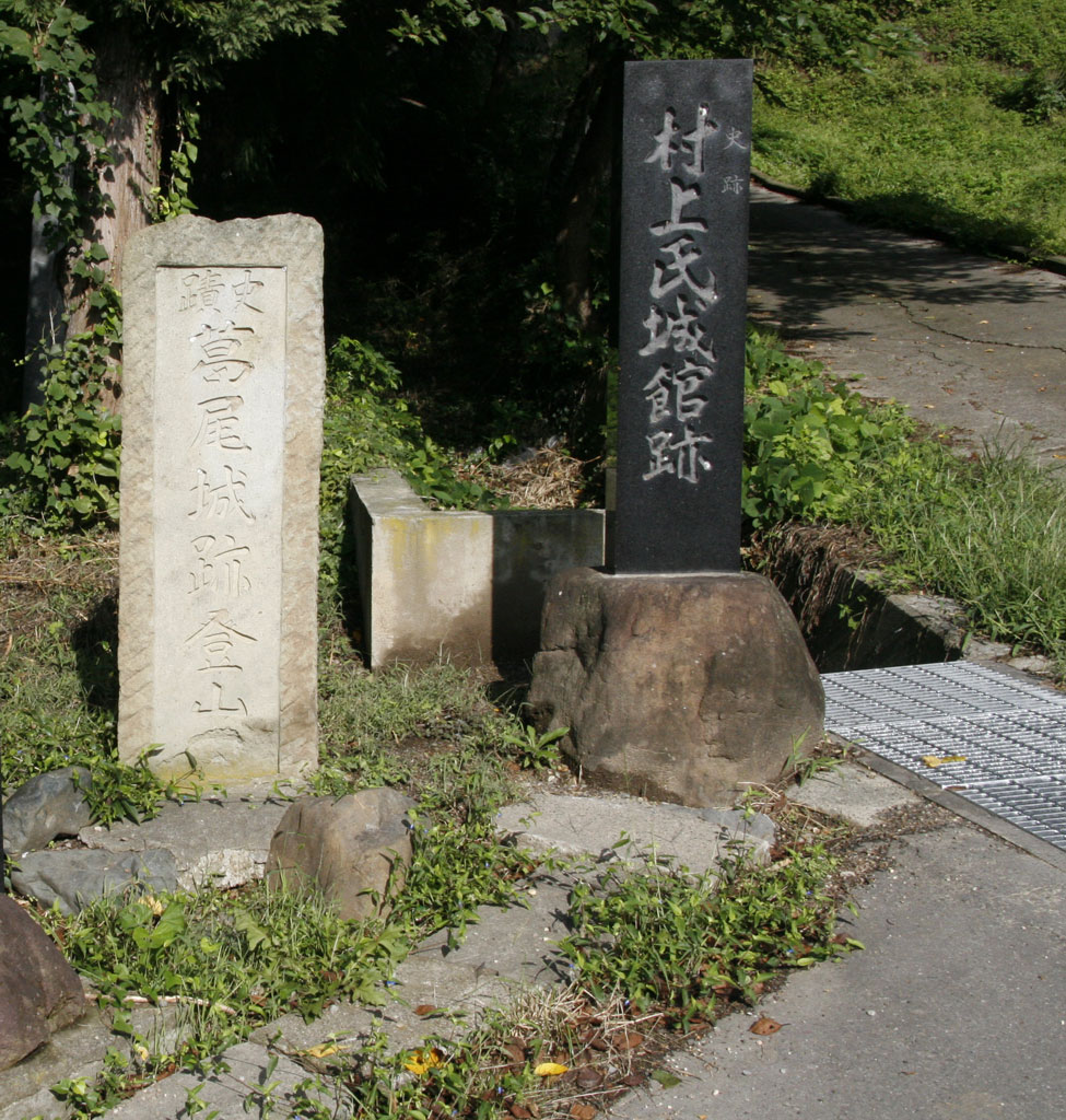 葛尾城登城口